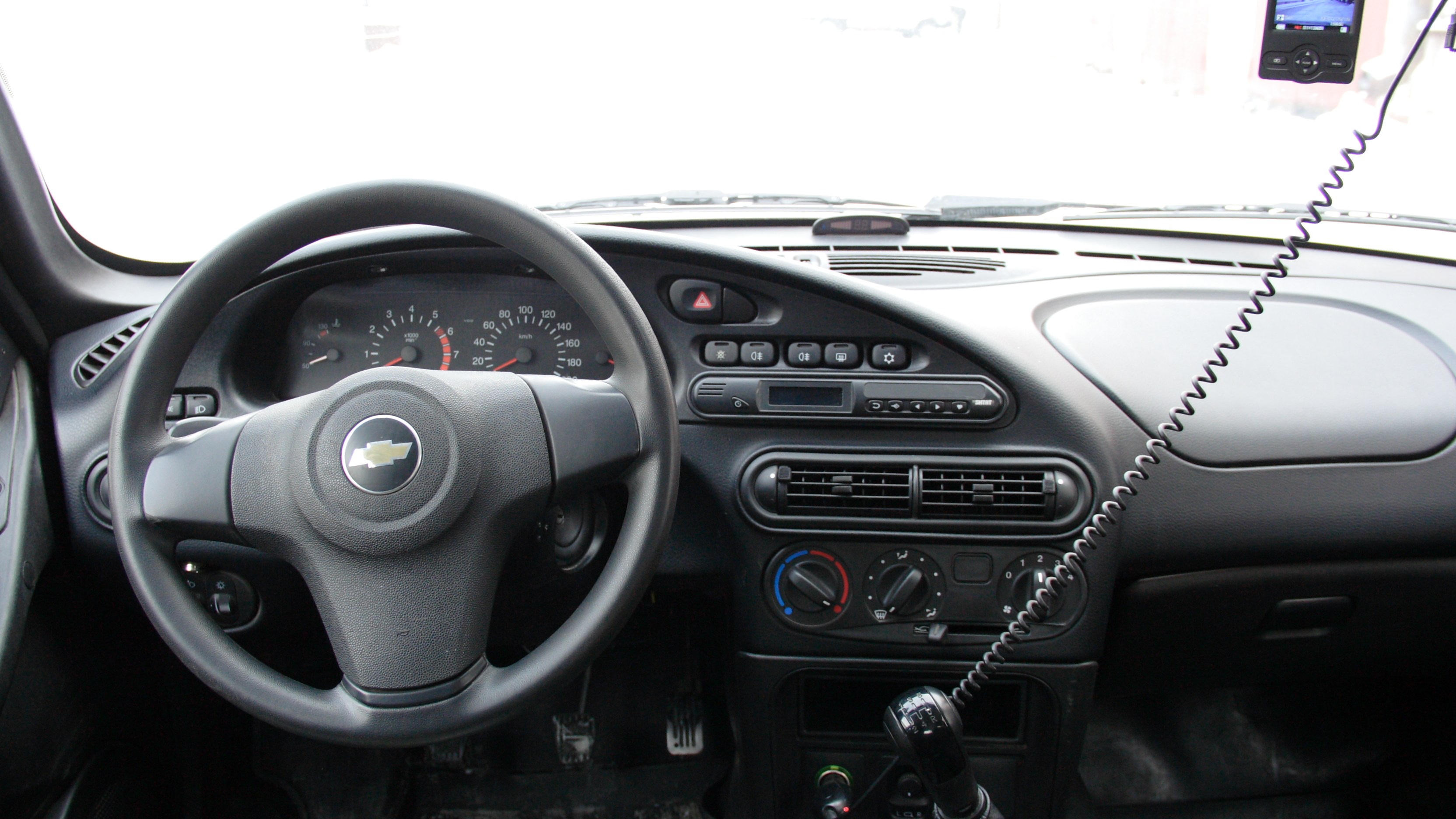 Место водителя в автомобиле Chevrolet Niva